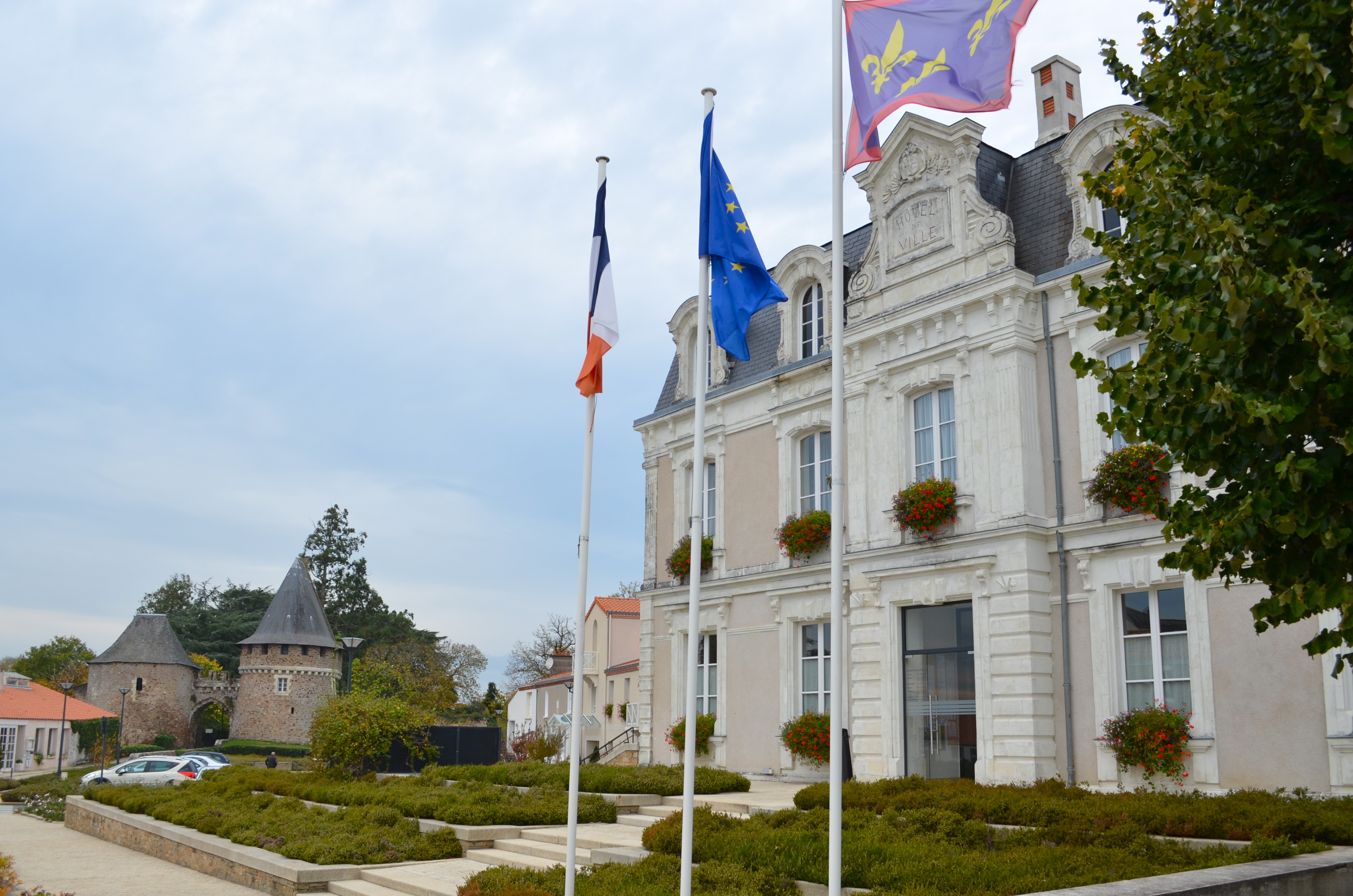 Hôtel de ville devant la porte du Château - Champtoceaux (Maine-et-Loire)